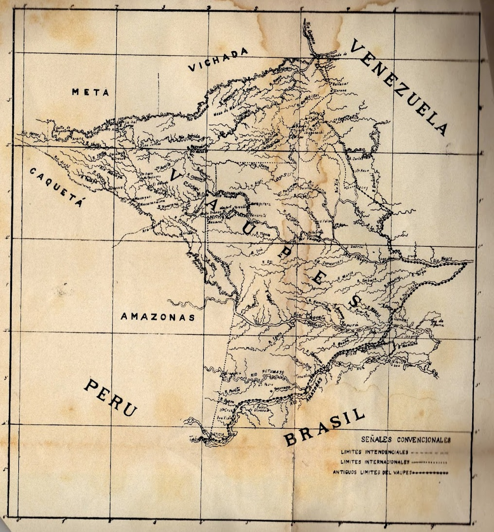 Mapa de la comisaría del Vaupés en 1930